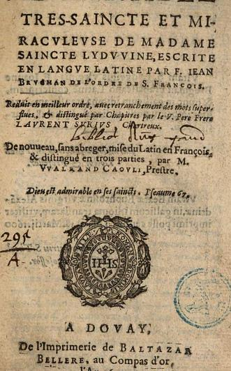 LA VIE ADMIRABLE TRES-SAINCTE ET MIRACVLEVSE DE MADAME SAINCTE LYDVVINE, ESCRITE EN LANGVE LATINE PAR F. JEAN BRUGMAN DE L'ORDRE DE S. FRANCOIS.. Reduit en meilleur ordre, avec retranchement des mots superflue, & dstingué par Chapitres par le V. Pere Frere LAVENT SVRIVS Chartreux. De nouveau, sans abreger, mise du Latin en François, & distingué en trois parties , par M. VvALRAND CAVLI, Prestre. Dieu est admirable en ses saincts. Pseaume 67. A DOVAY, De l'Imprimerie de BALTAZAR BELLERE, au Compas d'or, l'An 1601